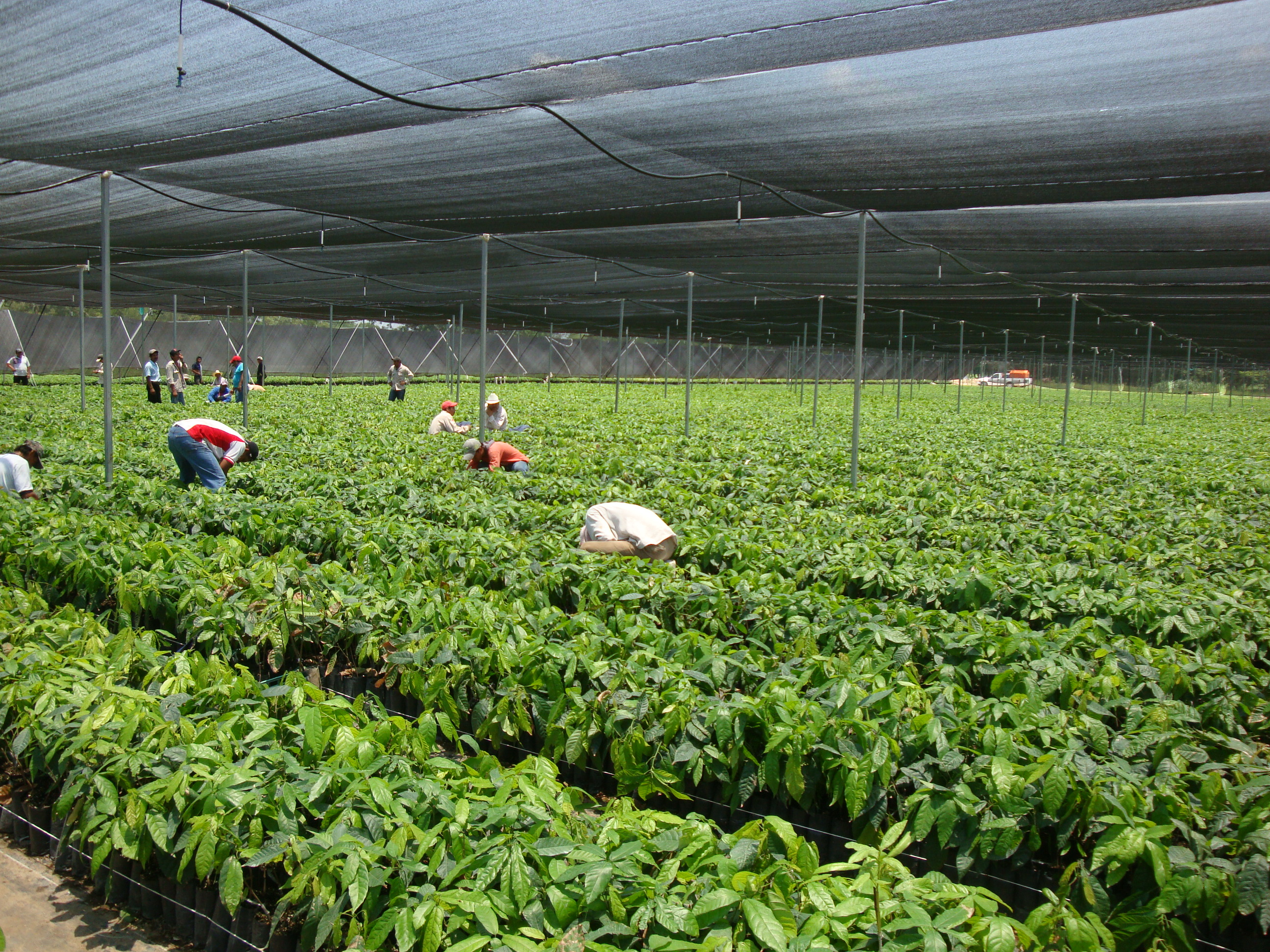 Invernadero de Cacao en el que se realzan producen plantas con ingertos para mejorar la producción cacaotera en el estado.